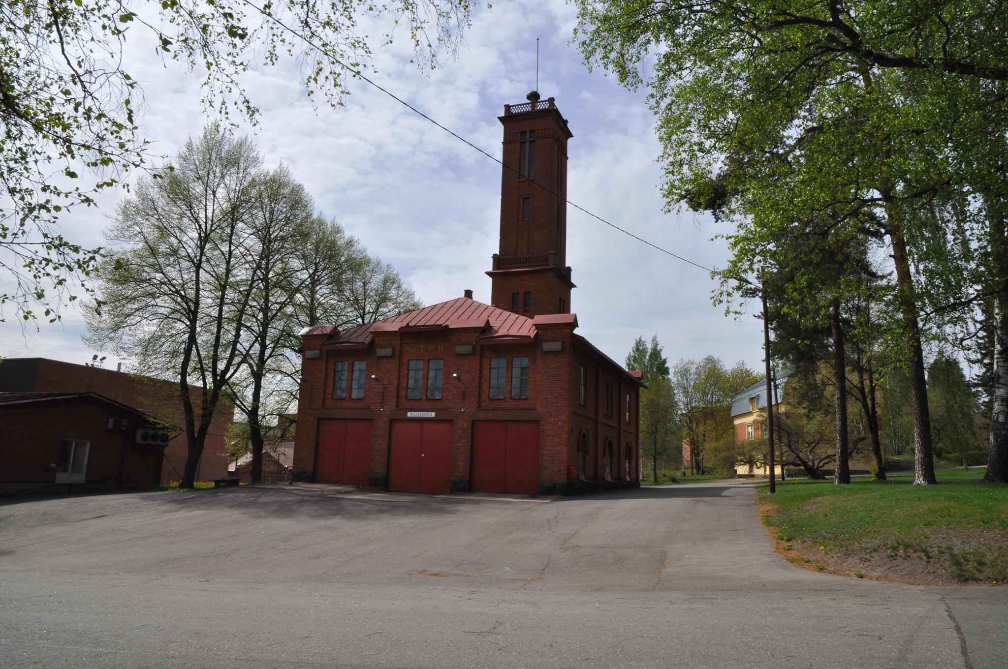 1913 rakennettu Voikkaan paloasema